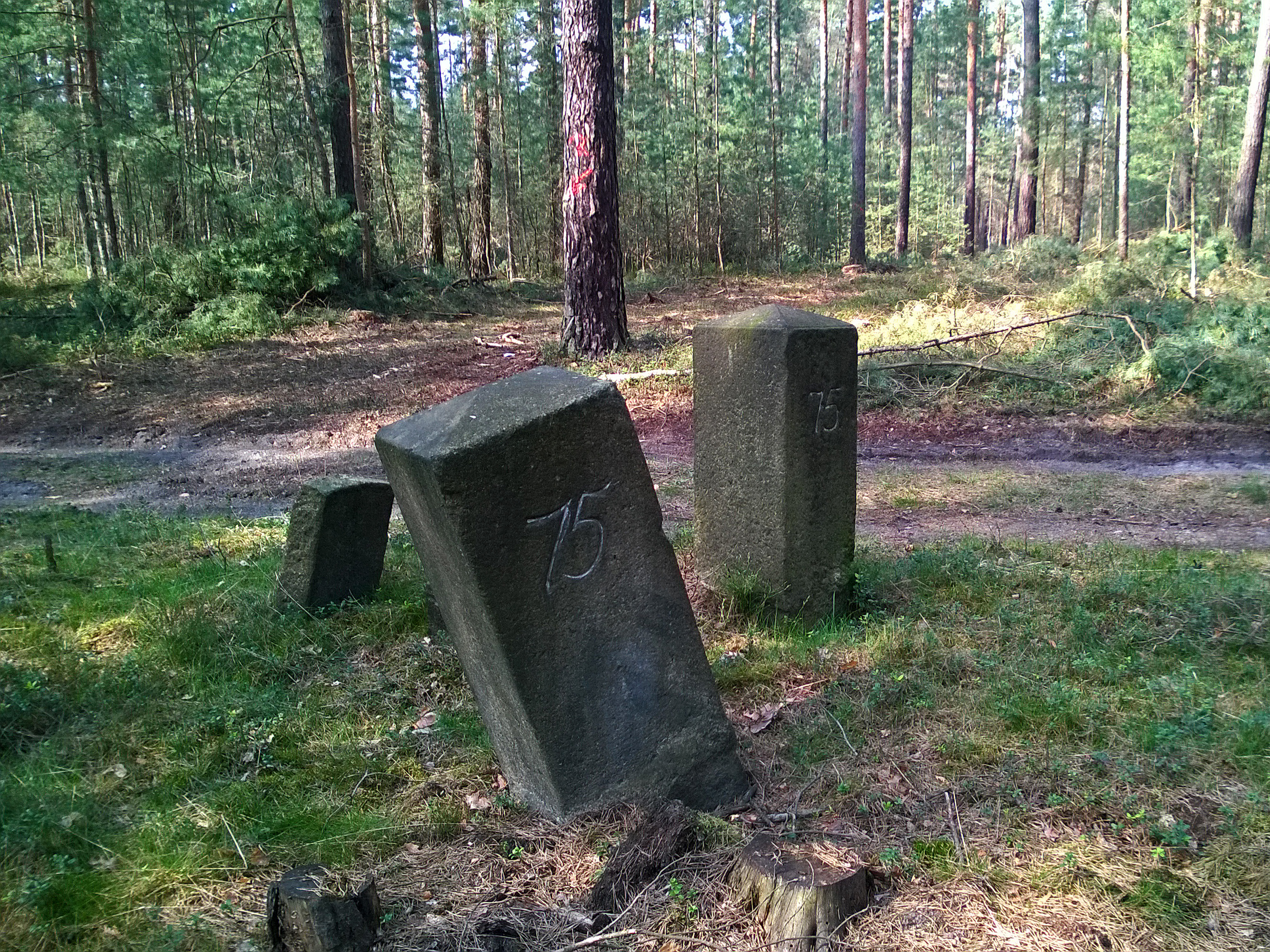 Grenzstein Nr. 75 Historische Landesgrenze Königreich Sachsen Königreich Preußen 1815 (Wiener Kongress) Hornjoserbsce: Historiski saksko-pruski měznik čo. 75 w holi mjez Turjom a Połpicu